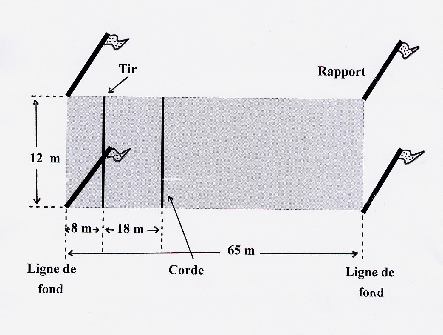 dimension d'un terrain de Ballon au poing avec la ligne de tir et la corde ainsi que les rapports et les lignes de fond. Picard: Térrain ed Ju d'balon aveuc el corde, el line éd tir et pi chés rapports et chés lines éd fond.